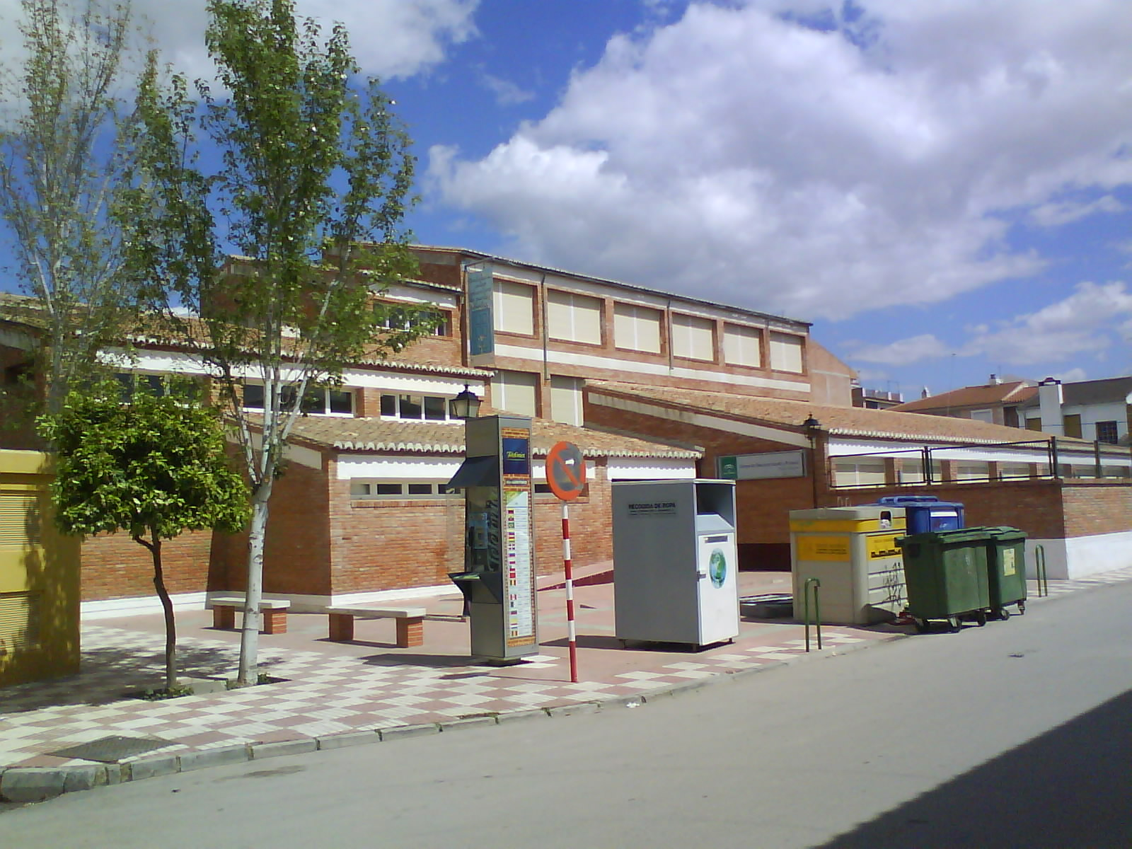 Imagen del Colegio Público Padre Manjón de Huétor-Tájar